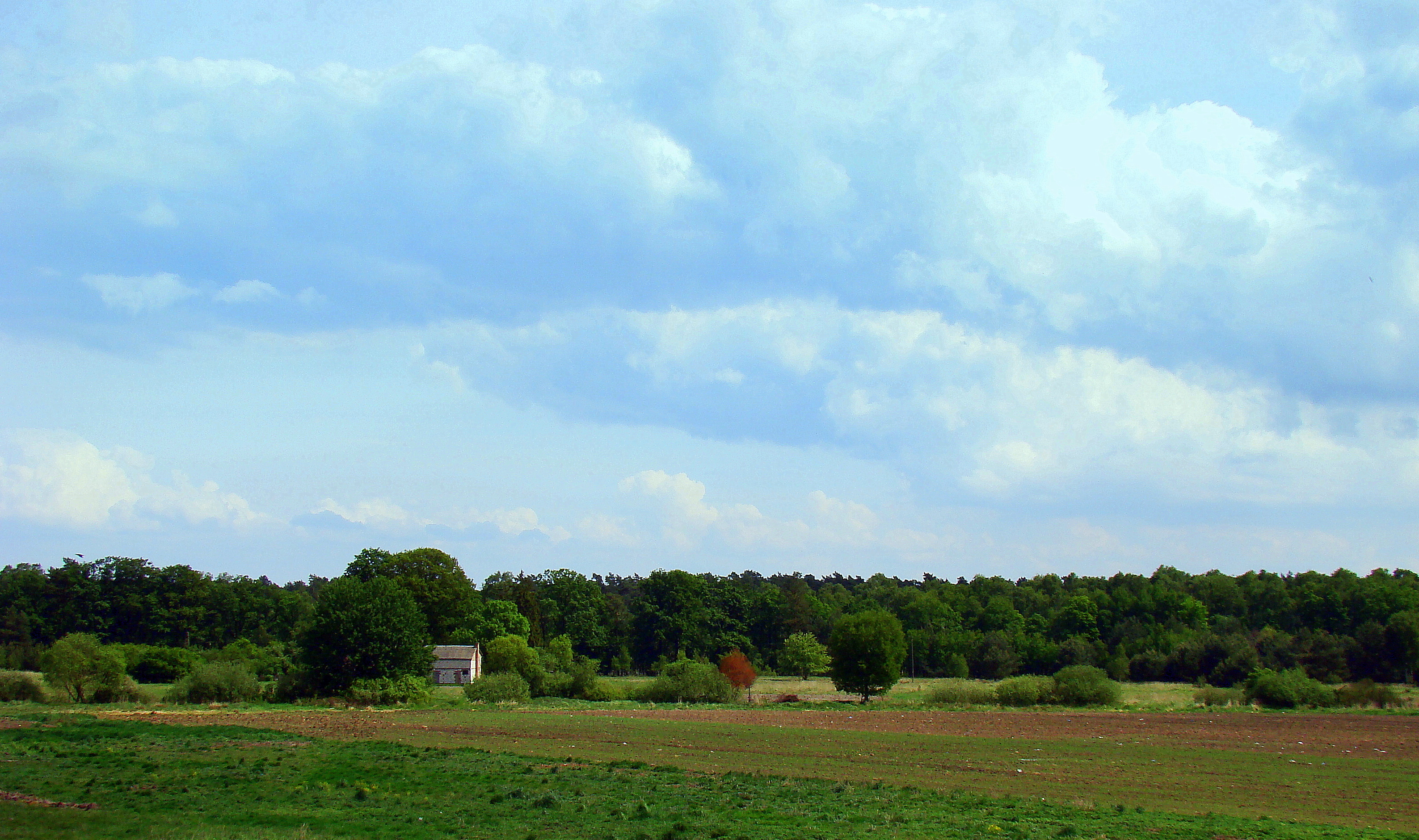 Karpin (widok ogólny), Puszcza Wkrzańska, (Powiat policki, Województwo zachodniopomorskie), Polska